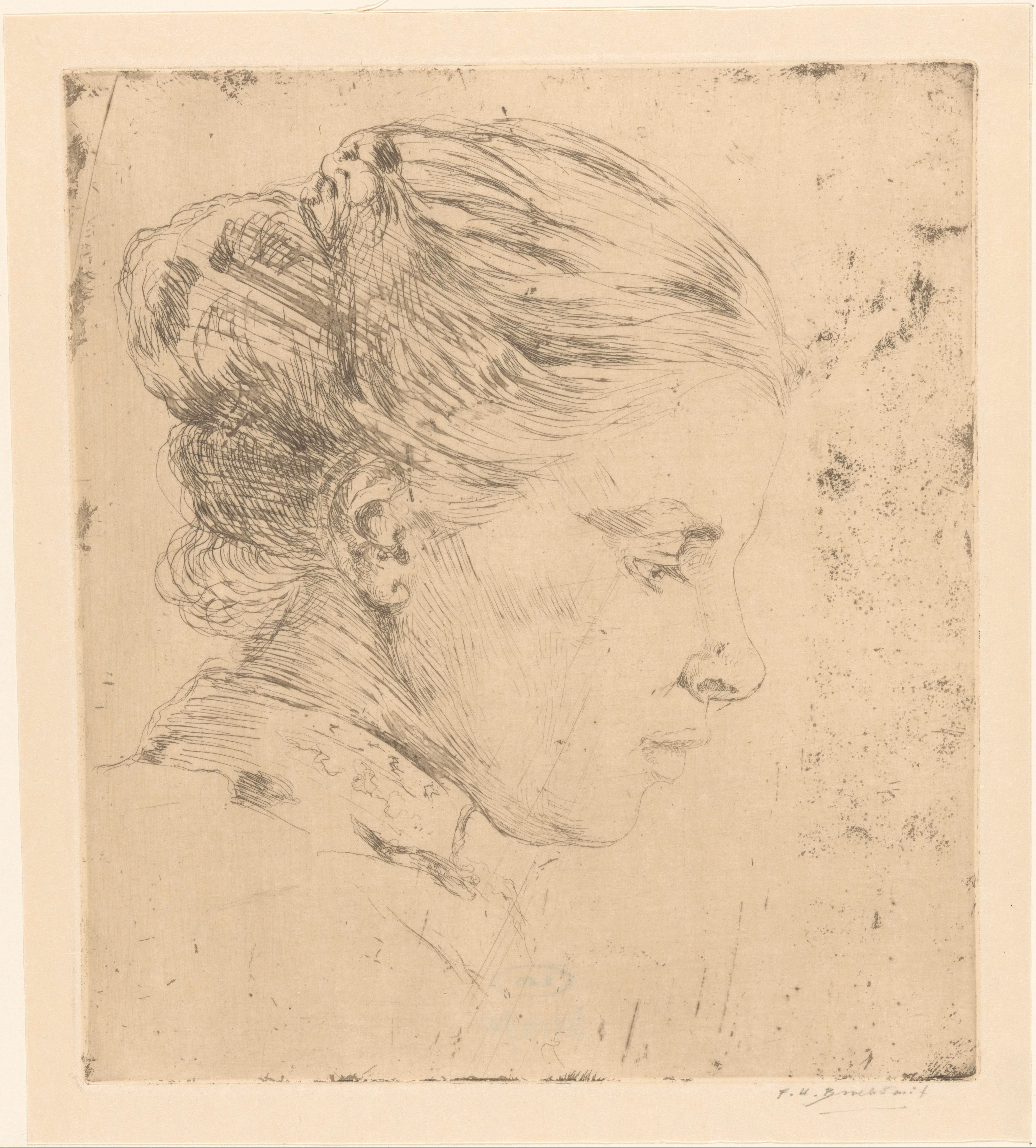 IdentificatieTitel(s): Portret van Cornelie Jannette Walen-BroeksmitObjecttype: prent Objectnummer: RP-P-1931-470Opschriften / Merken: verzamelaarsmerk, verso, gestempeld: Lugt 2228VervaardigingVervaardiger: prentmaker: Frederika Henriëtte Broeksmit (eigenhandig gesigneerd)Datering: 1885 - 1931Materiaal: papier Techniek: etsen / plaattoonAfmetingen: plaatrand: h 240 mm × b 213 mmOnderwerpWat: historical persons - BB - womanVerwerving en rechtenCredit line: Schenking van mevrouw F.H. BroeksmitVerwerving: schenking 1931Copyright: Publiek domein